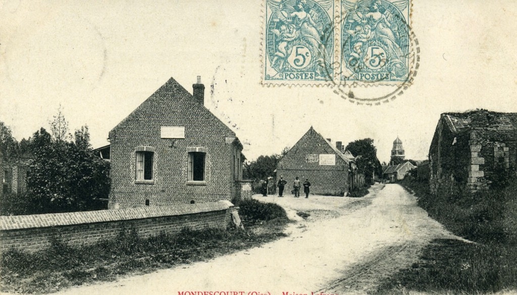 La rue de l'église et l'église avant 1914.